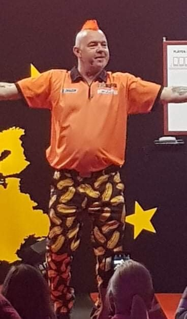 Peter Wright op het Dutch Darts Championship 2018 in Maastricht